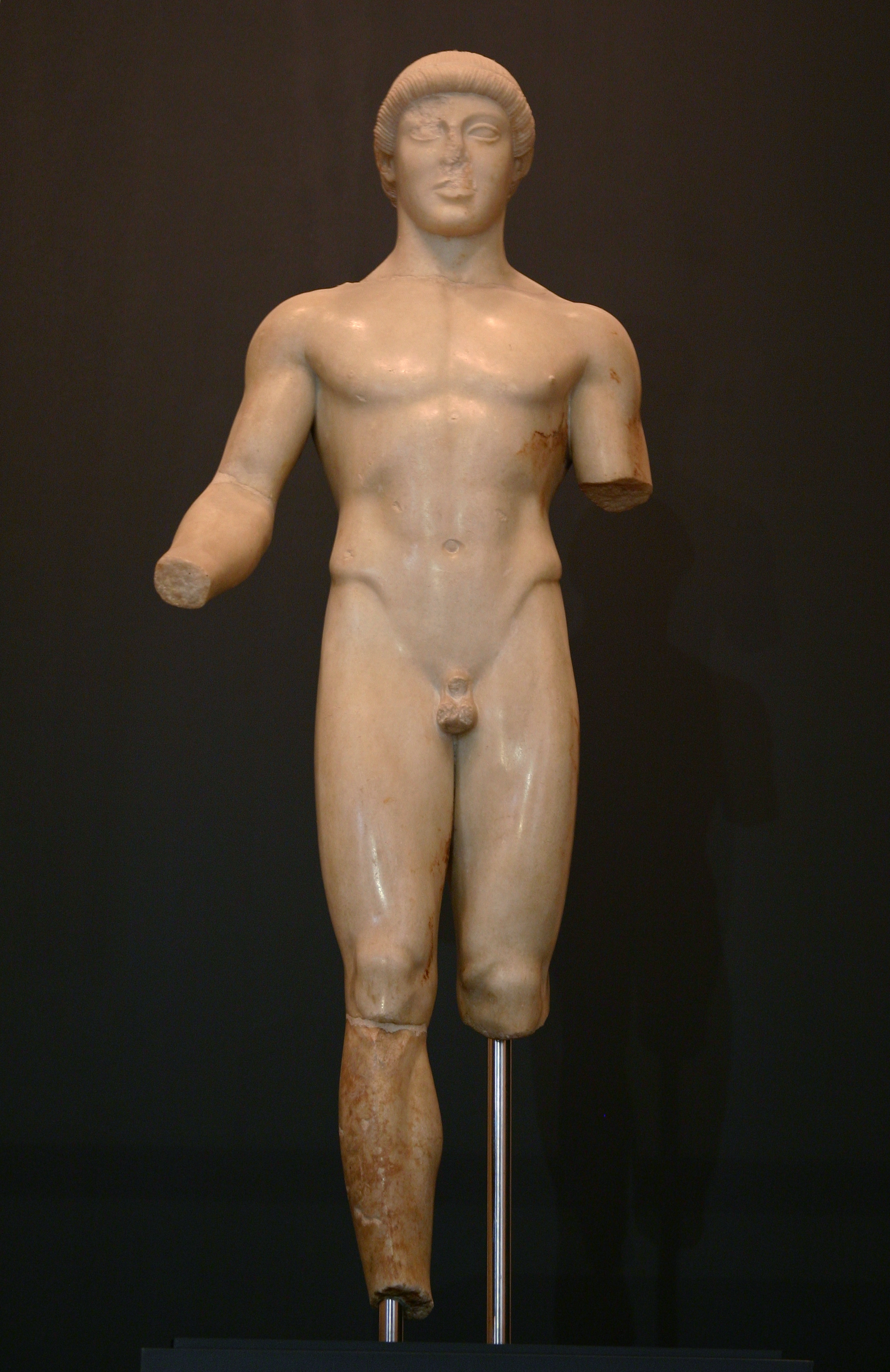 Museo Archeologico Regionale